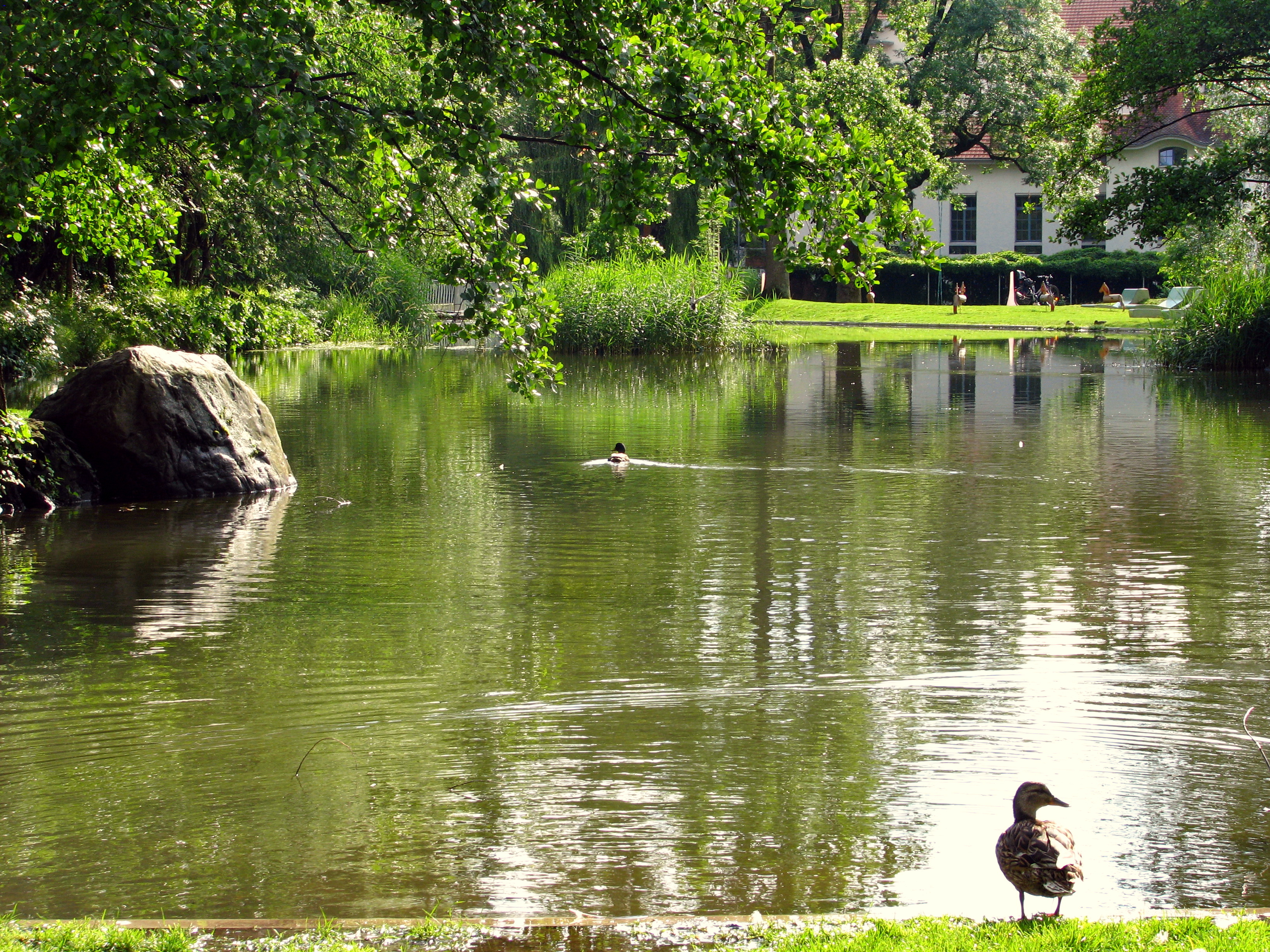 Stadtparkt in Uster (Schweiz)